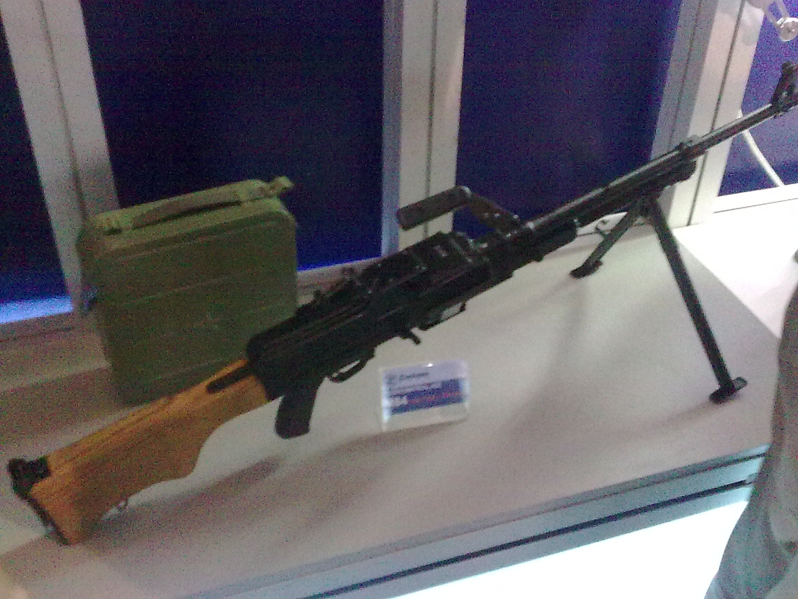 Пушкомитраљез М84 на сајму НВО